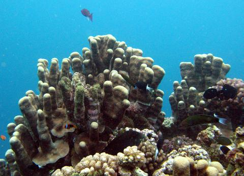 Psammocora haimiana, in situ. Pacífico sudoeste.